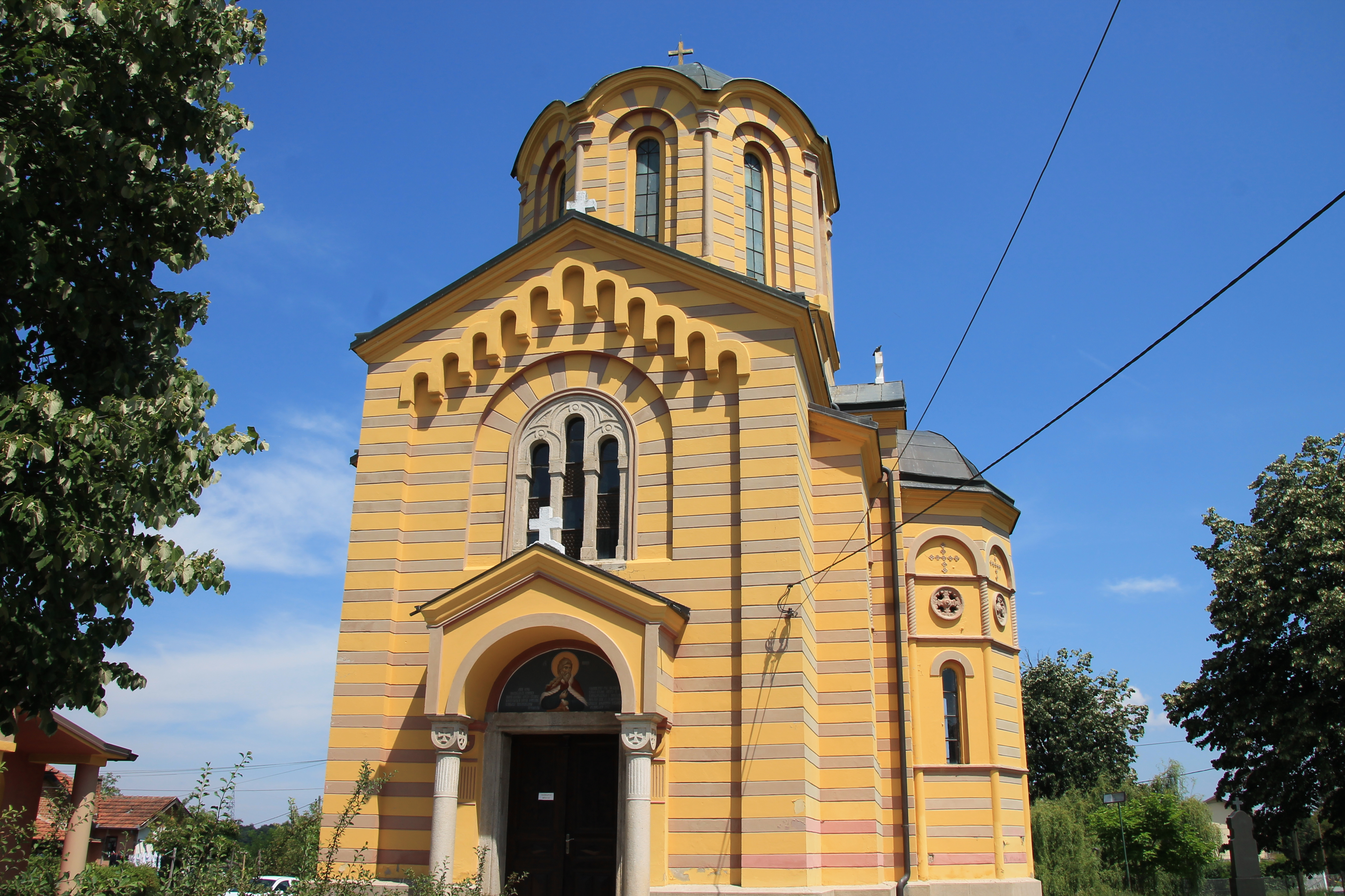 Crkva Sv. proroka Ilije (Knić)